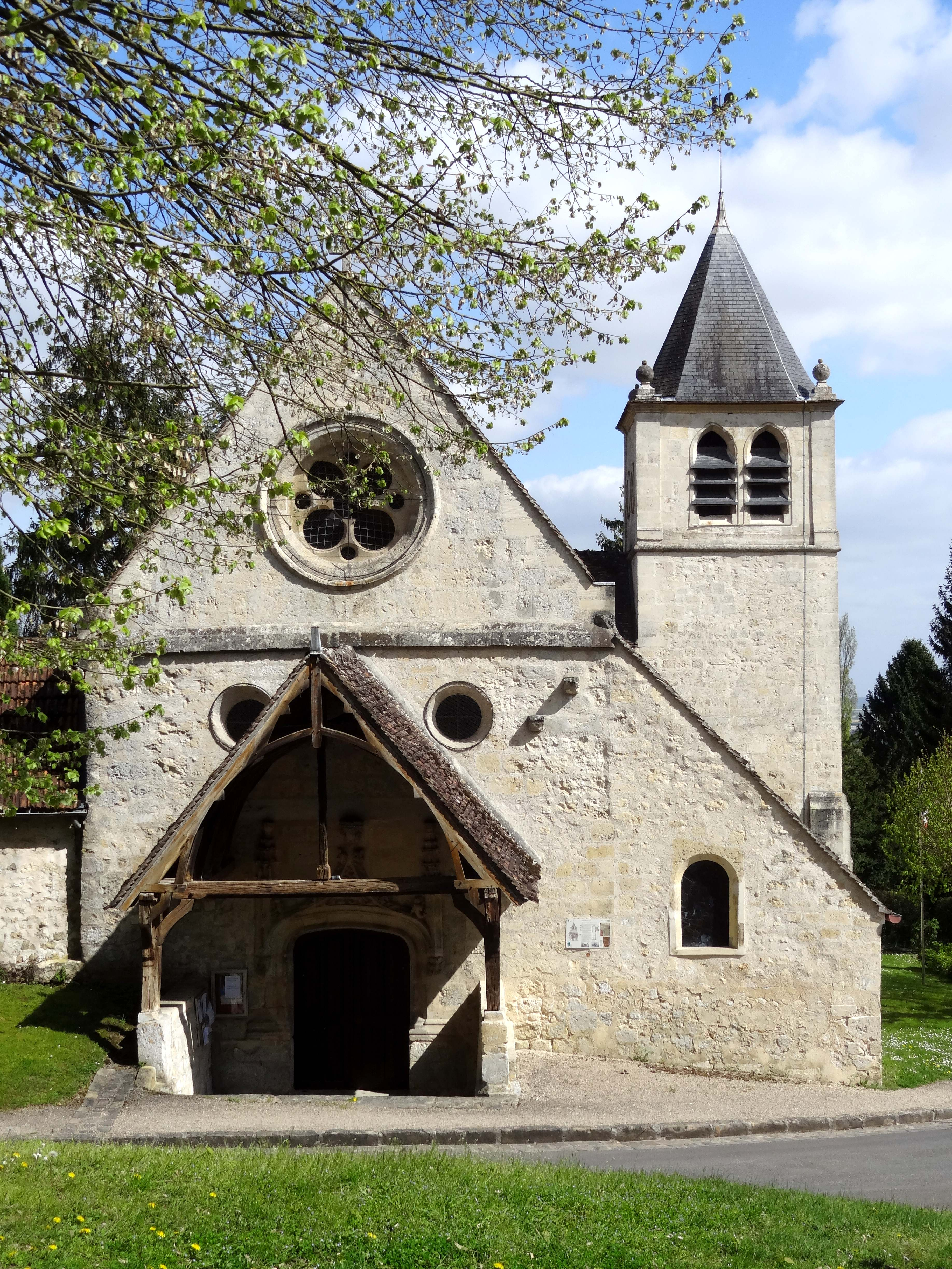 Église Saint-Georges de Ronquerolles - voir titre.